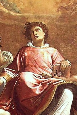 St Stephen(detail)